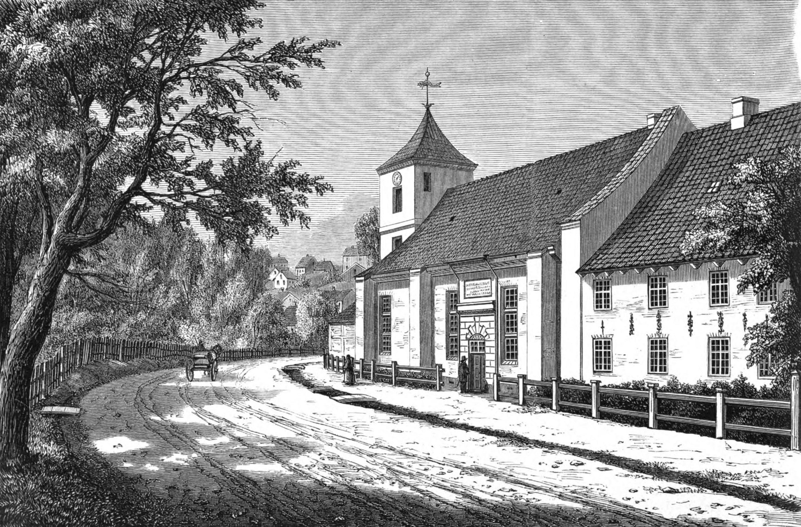 Oslo kirke, nuvarande Gamlebyen kirke, i Oslo.